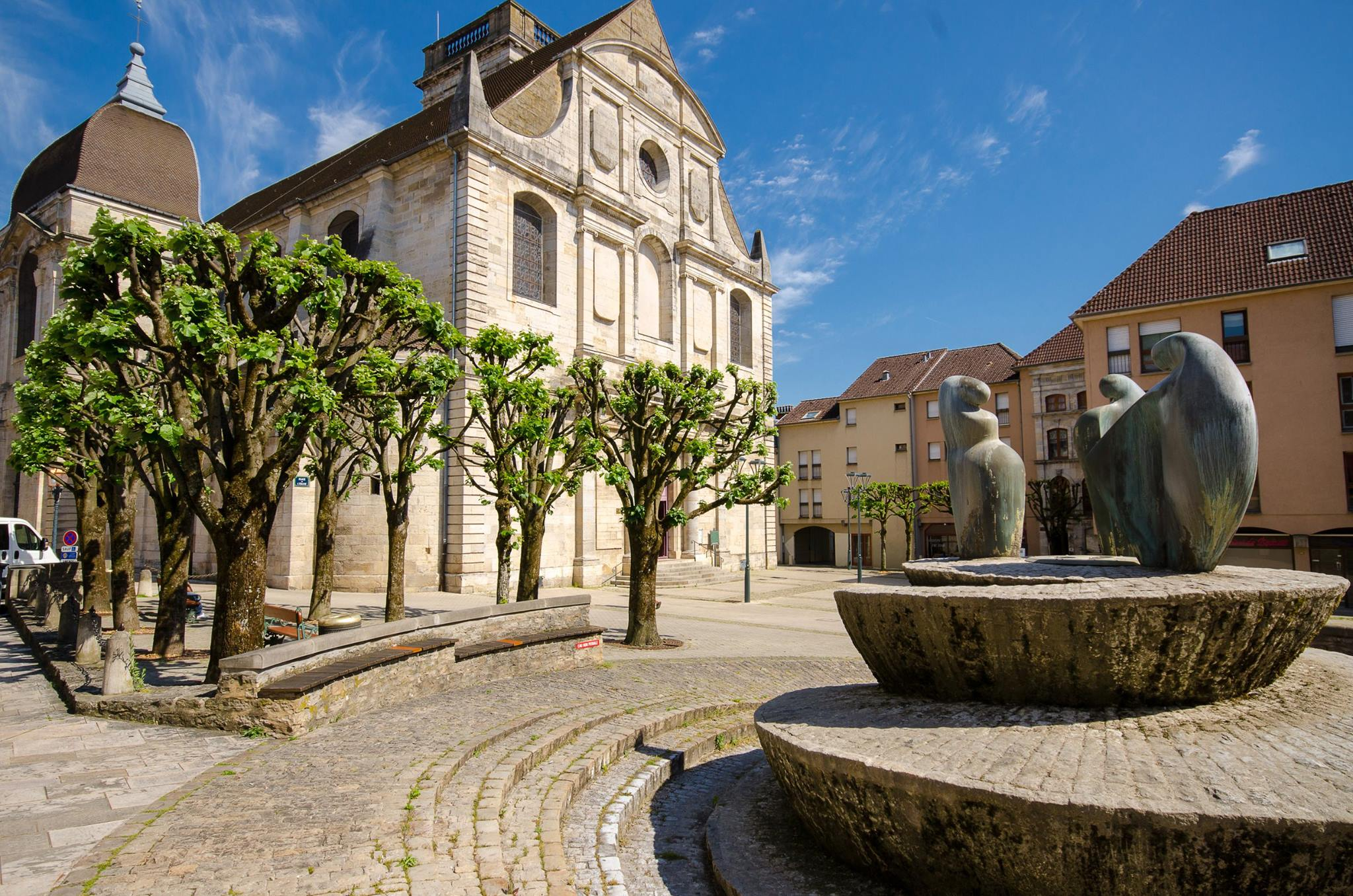 La place de l'Église de Vesoul (Haute-Saône)